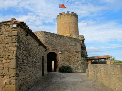 castell de Talamanca - Catalunya